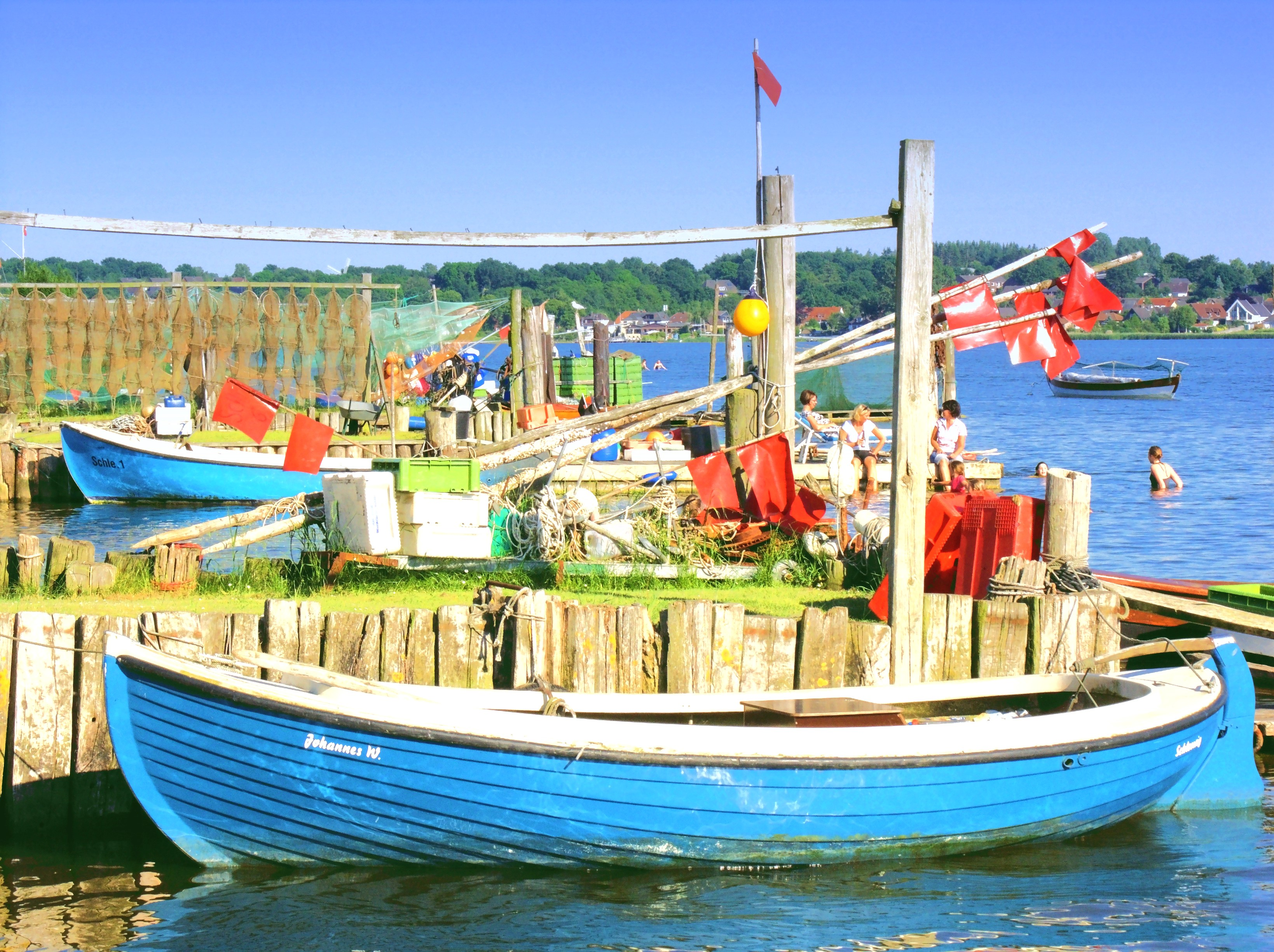 An der Schlei